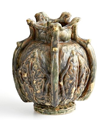 Vase par Georges Hoentschel, XIXe siècle